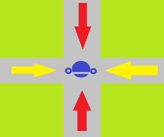 道路交通法による、手信号の合図 両手を真上に上げた場合。